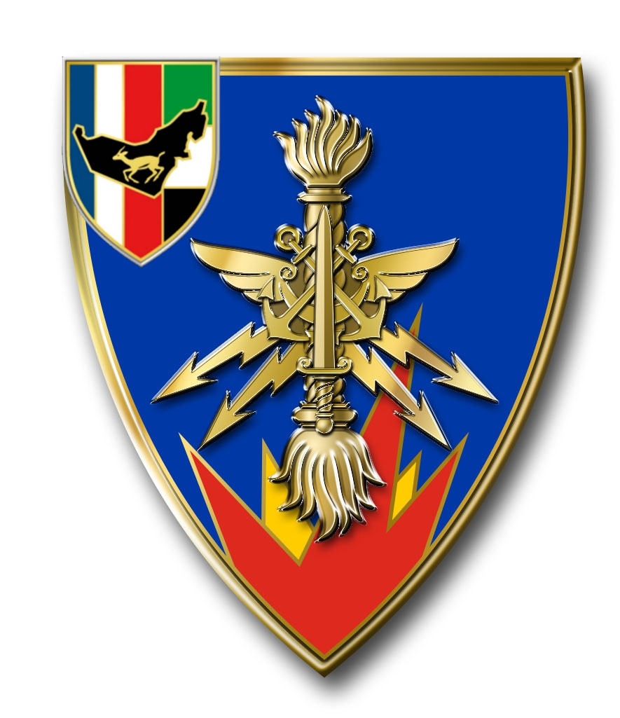 Insigne du GMu des EAU